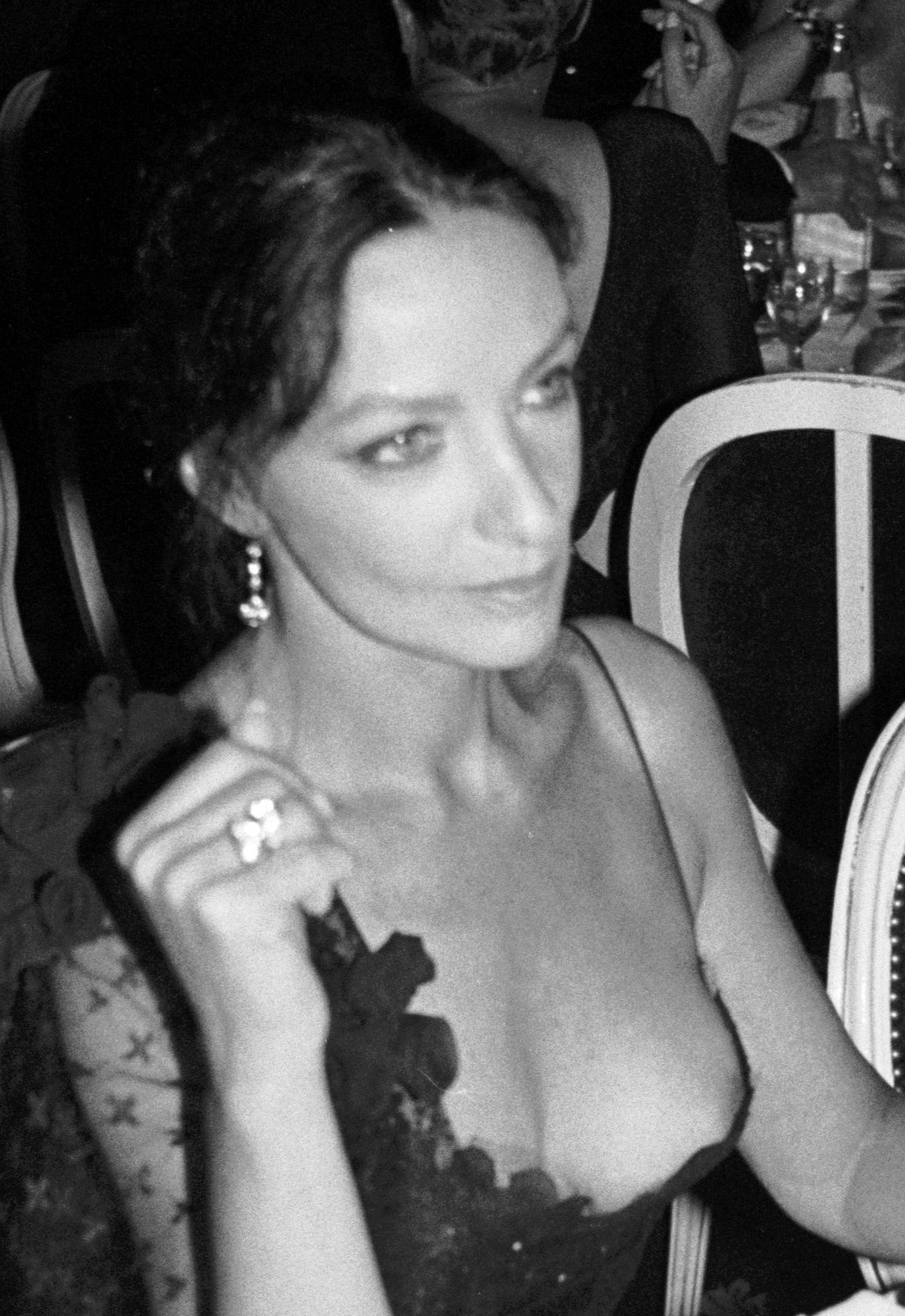 MARIE LAFORÊT . ACTRICE ET CHANTEUSE FRANÇAISE . FESTIVAL DU CINÉMA AMÉRICAIN . DEAUVILLE . SEPTEMBRE 1989.